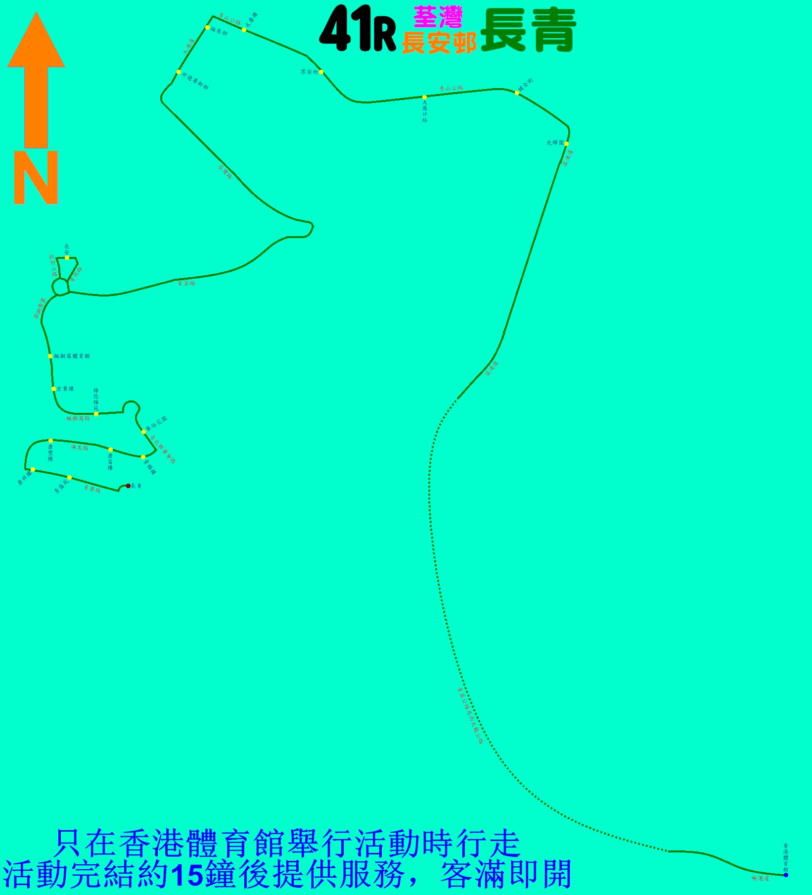 中文（香港）: 九巴41R線的走線圖